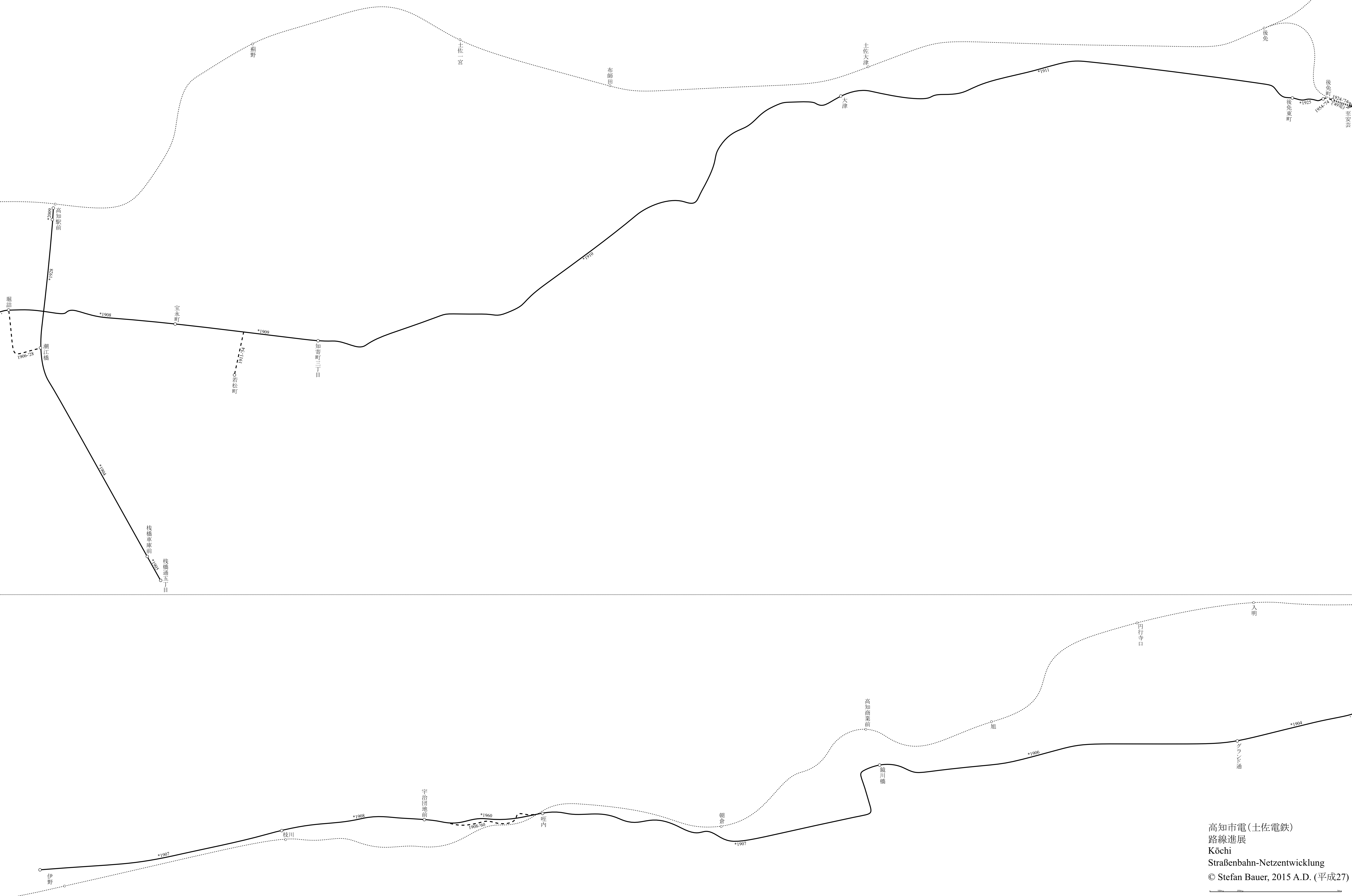 高知市電(土電)の路線進展図